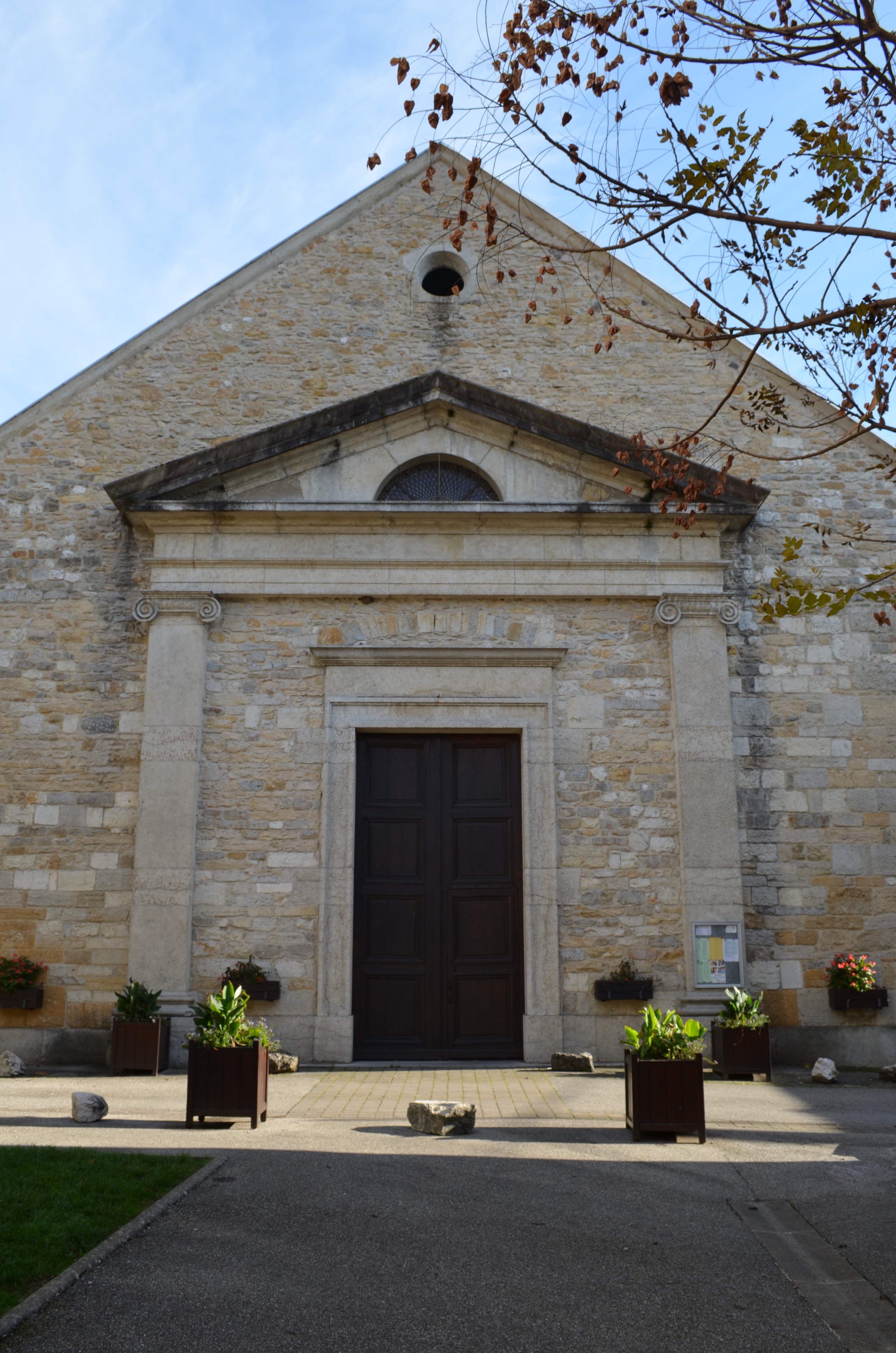 Photographie de Vaux-en-Bugey, Ain, France.